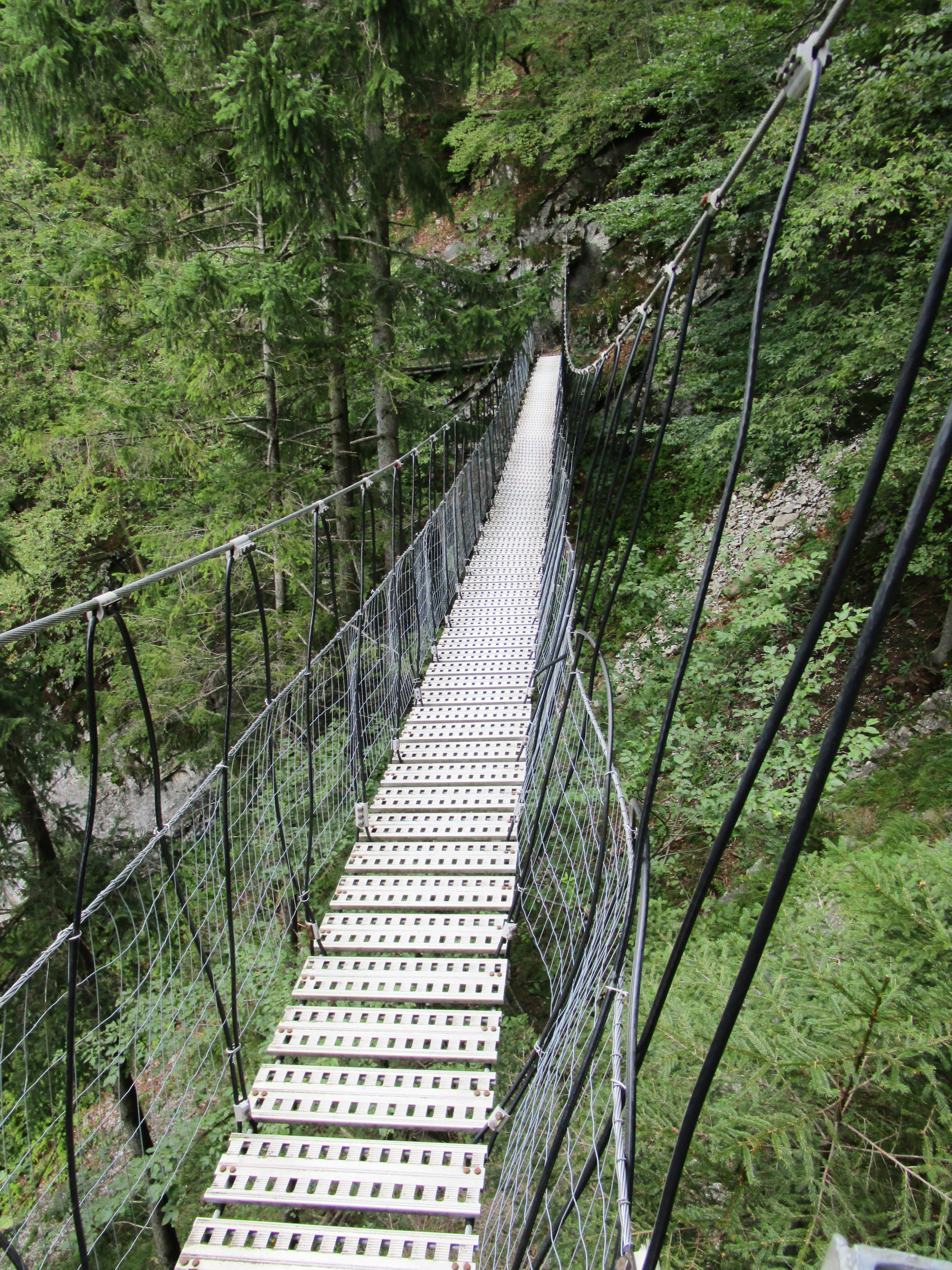 Hängebrücke am Jägersteig am Ostufer der Weizklamm